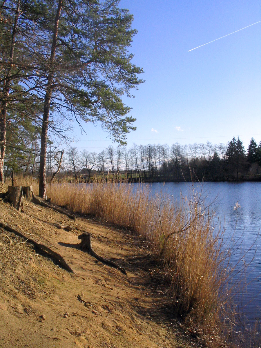 Třemošenský rybník v Plzni. Pohled od skalnaté stráně na severovýchodním břehu k jižnímu břehu.